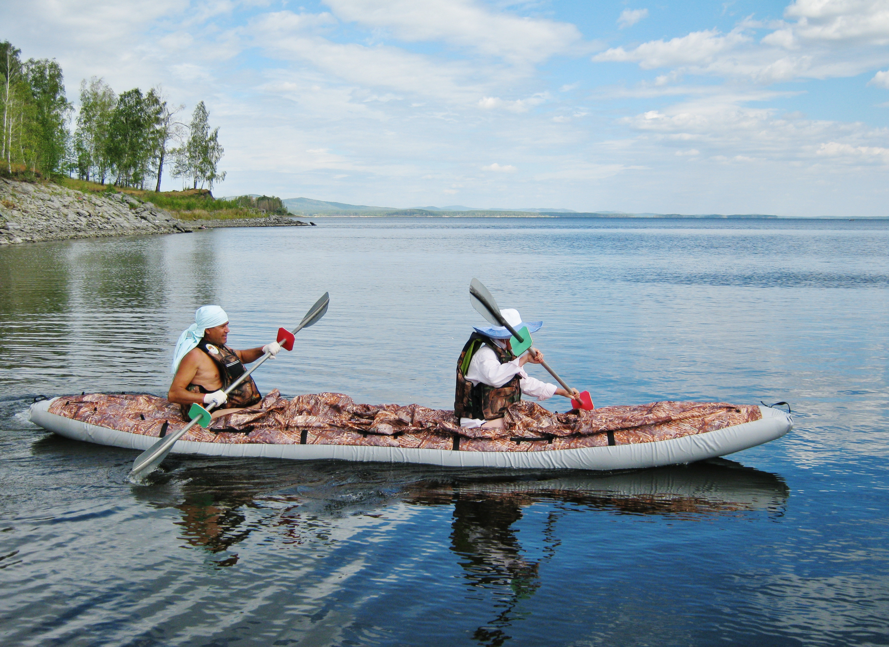 На Аргазинском водохранилище.